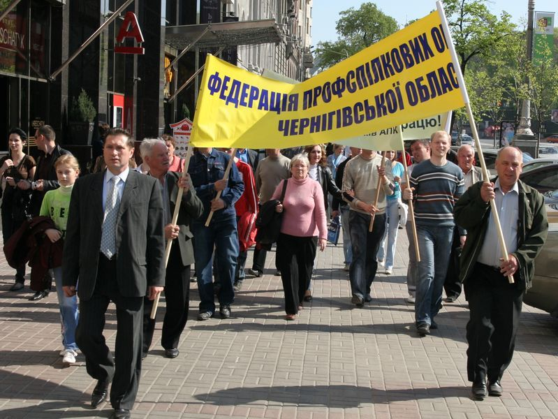 1 travnya FPU.jpg: Участь представників Федерації профспілкових організацій Чернігівської області в мітингу, 1 травня 2010 року